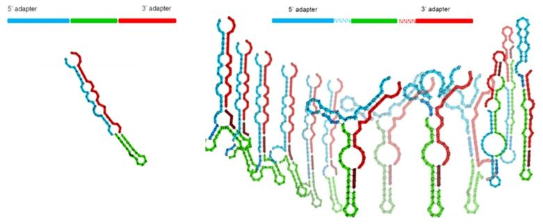 Spėjama miR-29b struktūra, kai prie jos priliguojami standartiniai Illumina adapteriai, ir galimos miR –29b struktūros, kai liguojami modifikuoti adapteriai su degeneruotais galais.